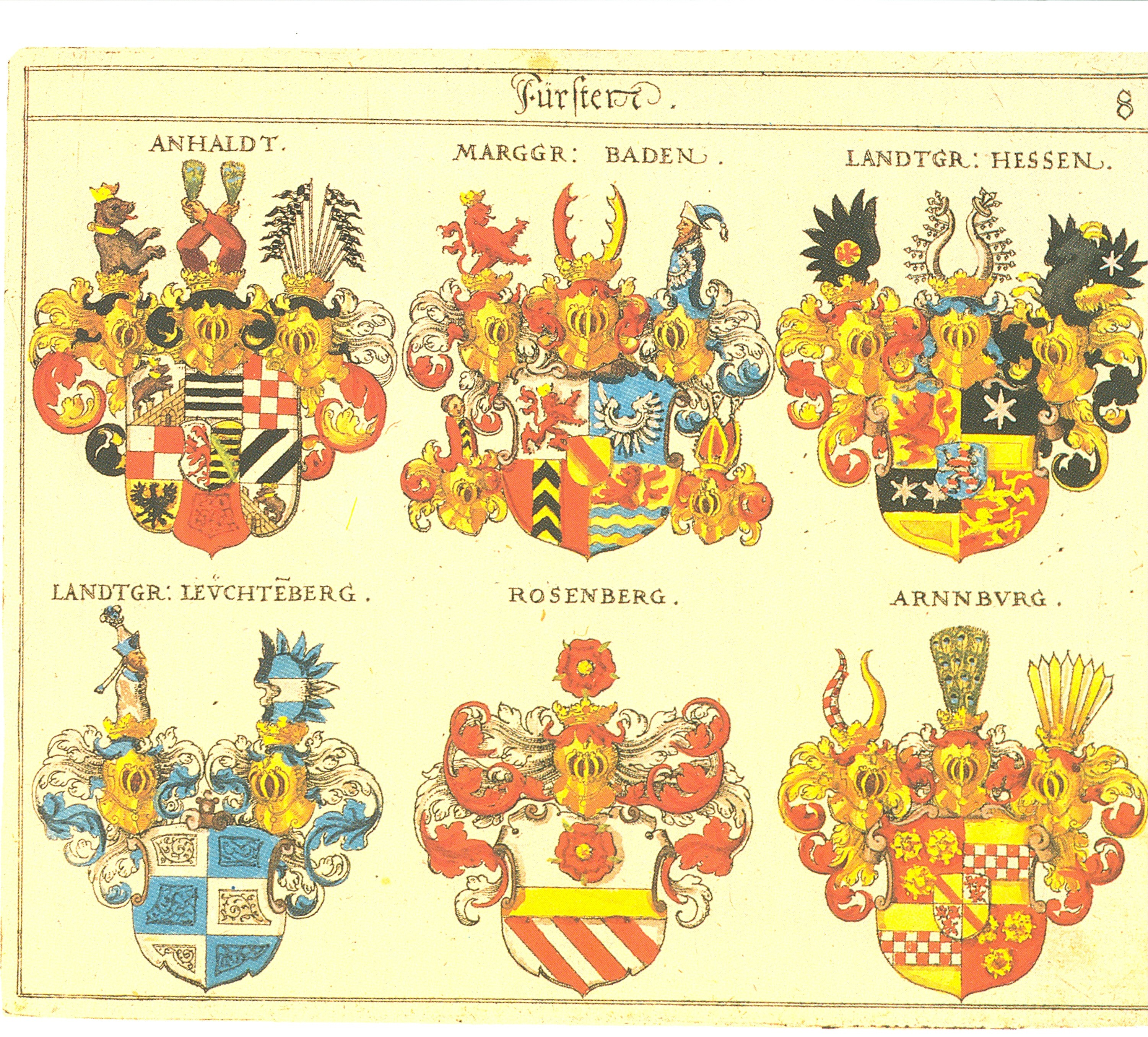 Johann Siebmacher: New Wappenbuch Fürsten Blatt 8